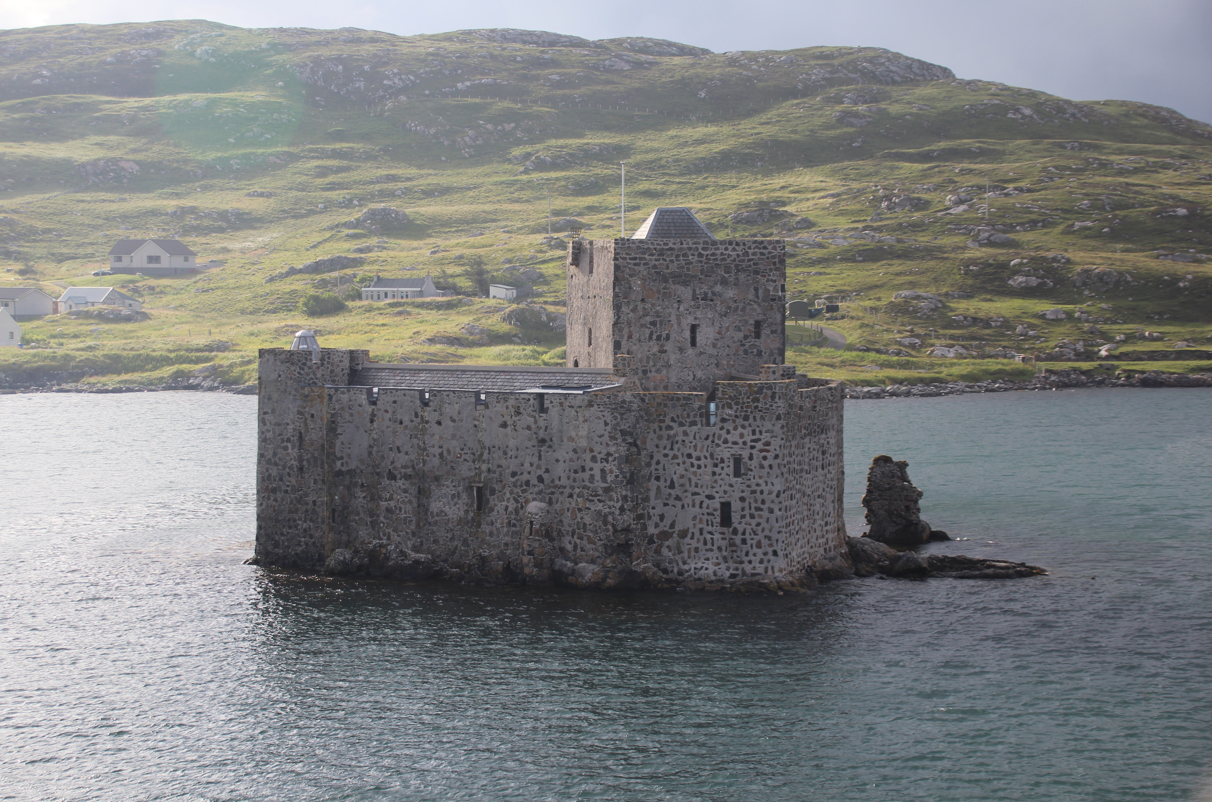 Blick von der auslaufenden Fähre auf Kisimul Castle vor Castlebay, Barra, Äußere Hebriden, Schottland